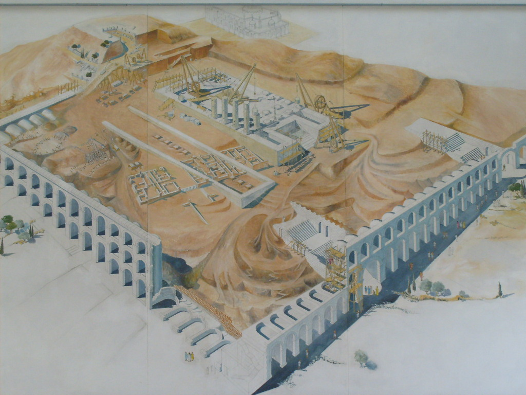 Représentation du terrassement de la Byrsa romaine exposée au Musée national de Carthage (Tunisie)